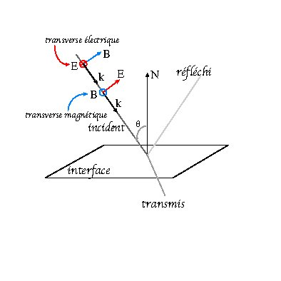 Géométrie et polarisation à la réflexion-transmission Description de l'image : schéma explicatif de la géométrie caractéristique aux plans de polarisation d'une onde lumineuse incidente sur une surface. Source : créée à l'occasion de la rédaction de l'article angle de Brewster. Statut : Licence de documentation libre GNU (GFDL : GNU Free Documentation Licence).